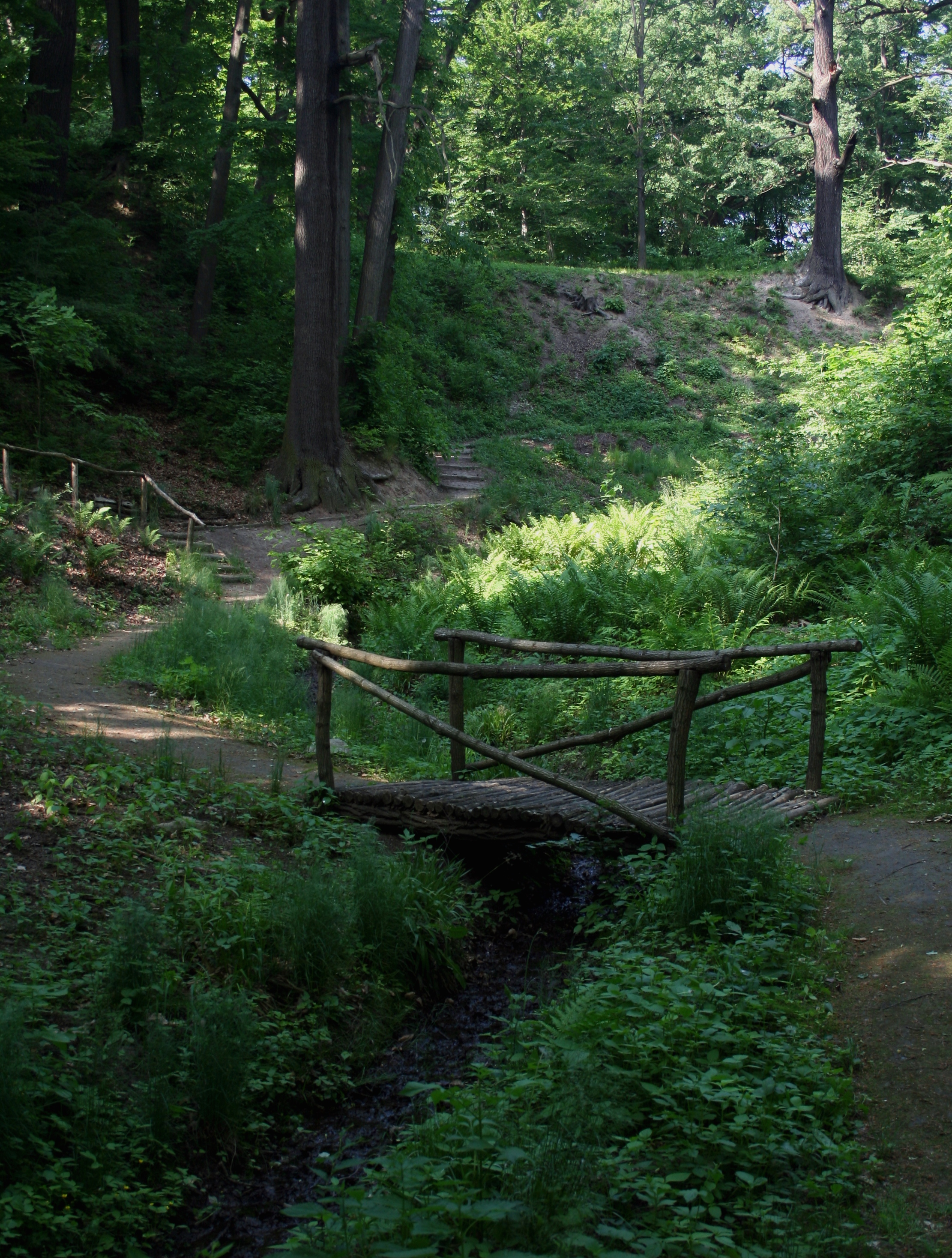 Park Mużakowski, fragment